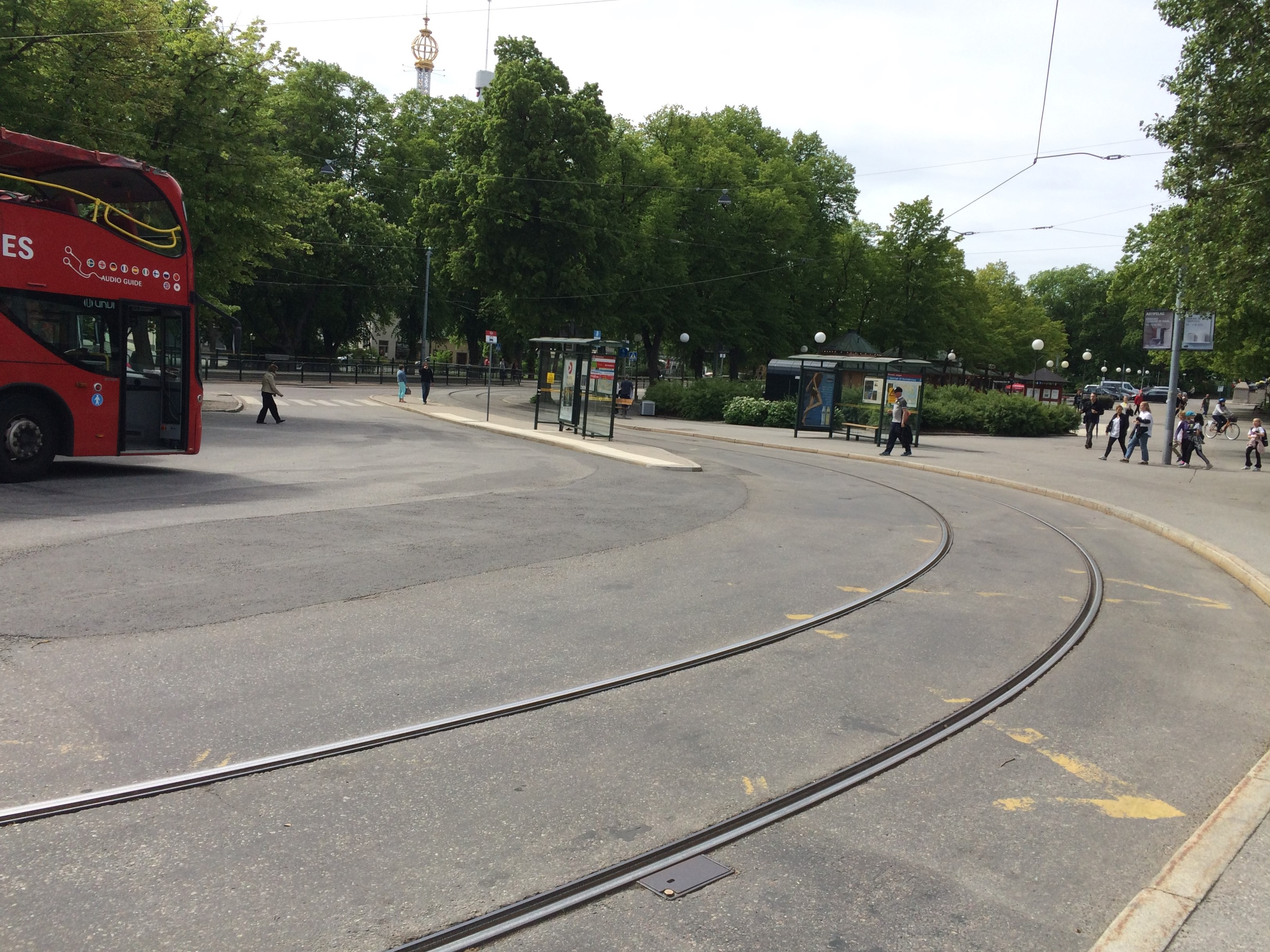 Skansenslingan buss och spårvagnshållplats